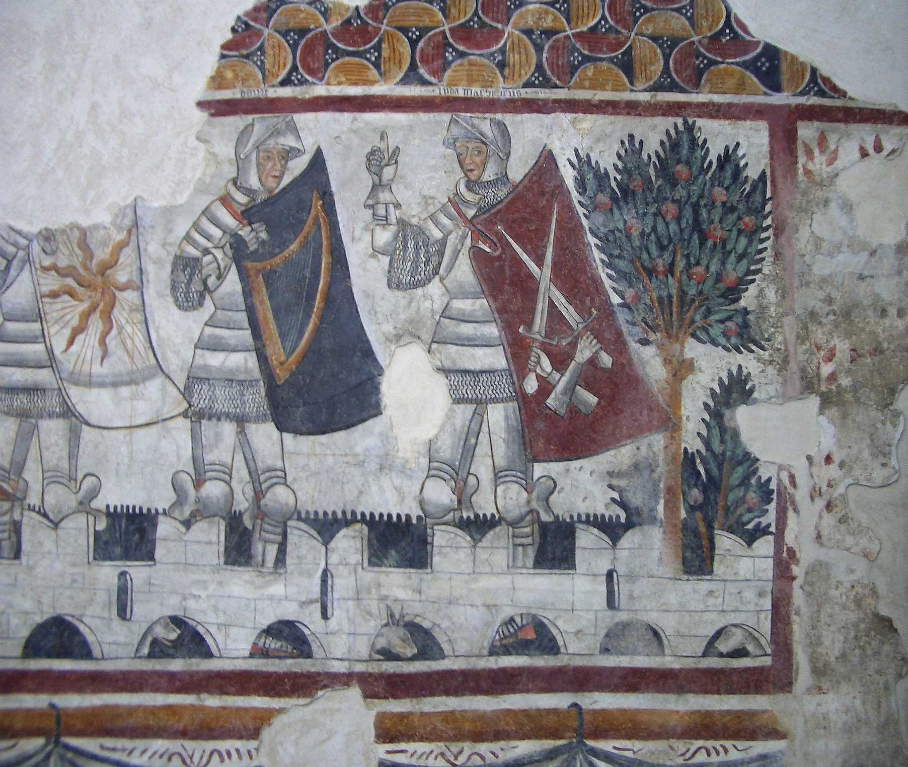 Giacomino di Ivrea, Nine Worthies, fresco removed from the castle of Villa Castelnuovo, ca. 1440-45, Cuorgnè, Museo Archeologico del Canavese